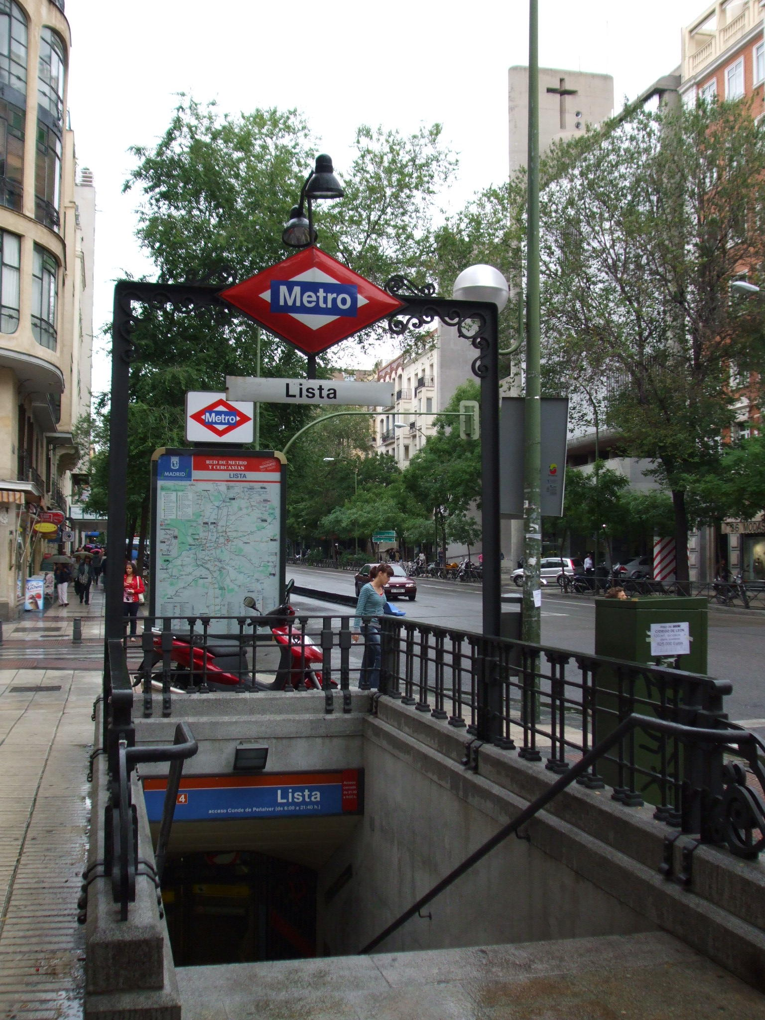 Estación de Lista al fondo Iglesia de Nuestra Señora del Rosario de Filipina